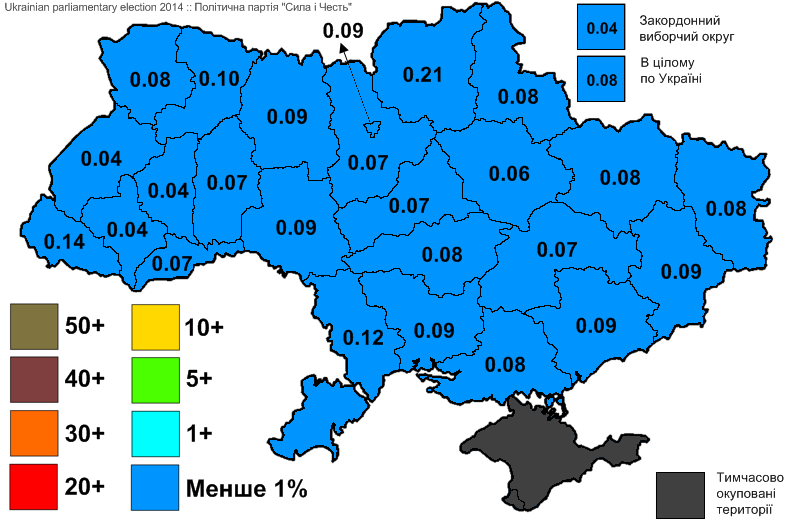 Результати виборів до Верховної Ради України, які відбулись 25 жовтня 2014 року. Інформація з офіційного сайту ЦВК. Політична партія "Сила і Честь".